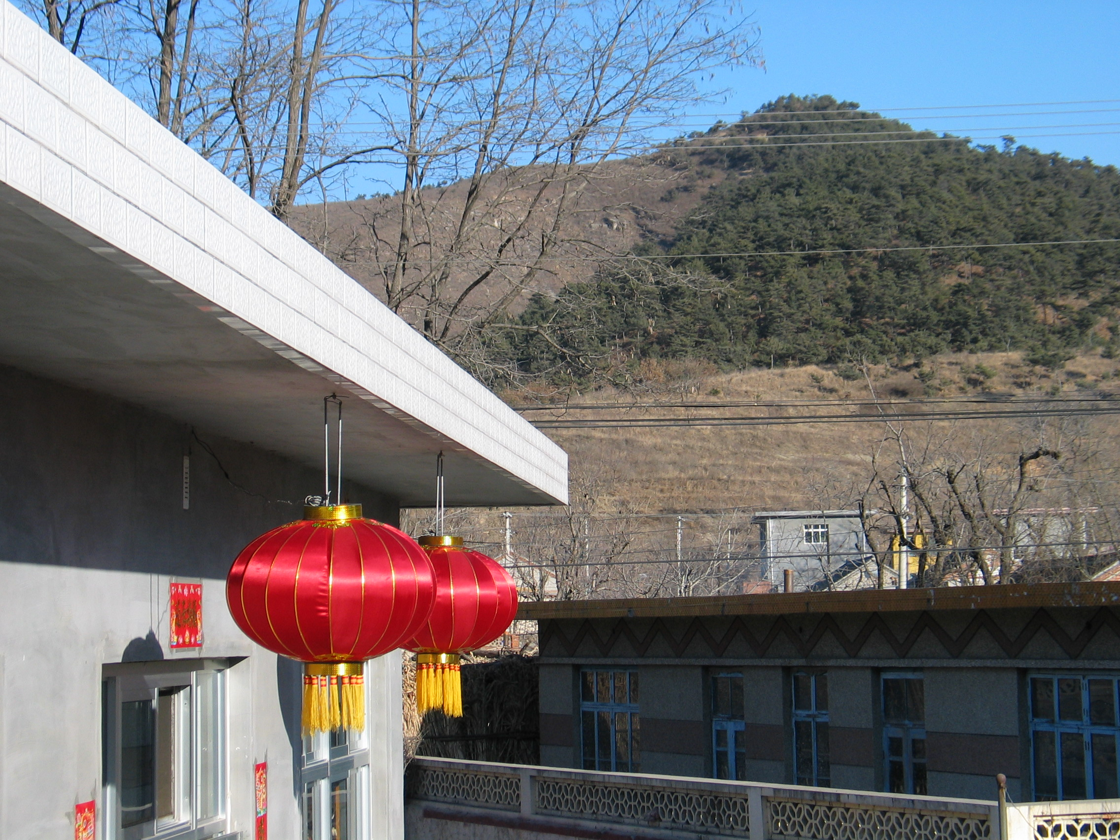 挂红灯笼过年